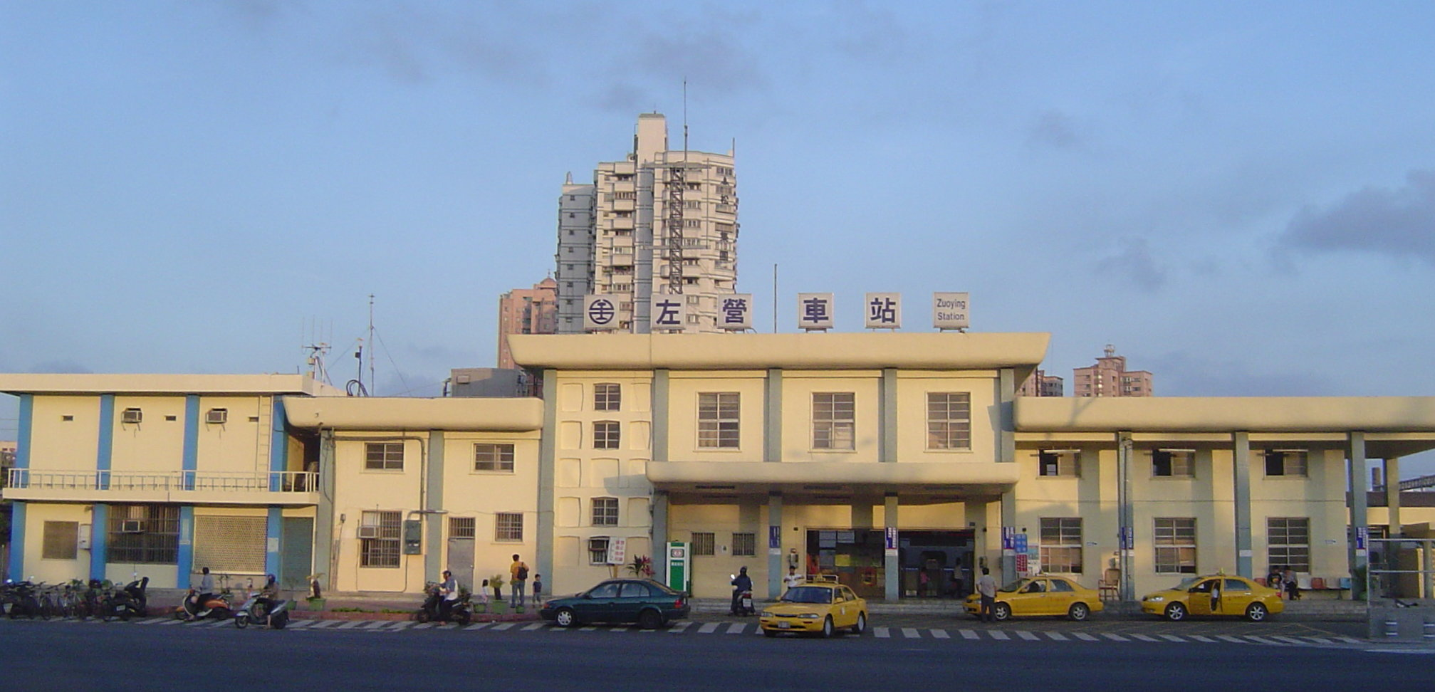 臺灣鐵路管理局左營車站。